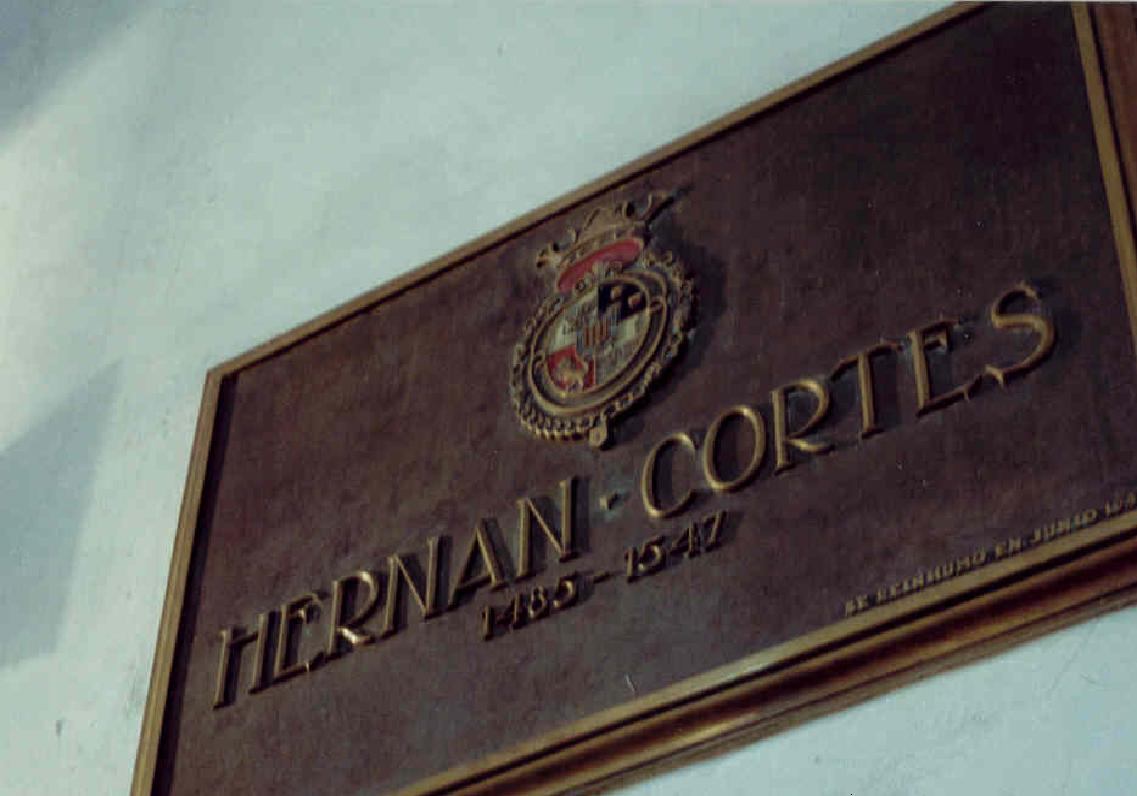 Placa que señala dónde está enterrado Hernán Cortés, en el Hospital de Jesús, México, DF. author: Xavier Lopez Medellin